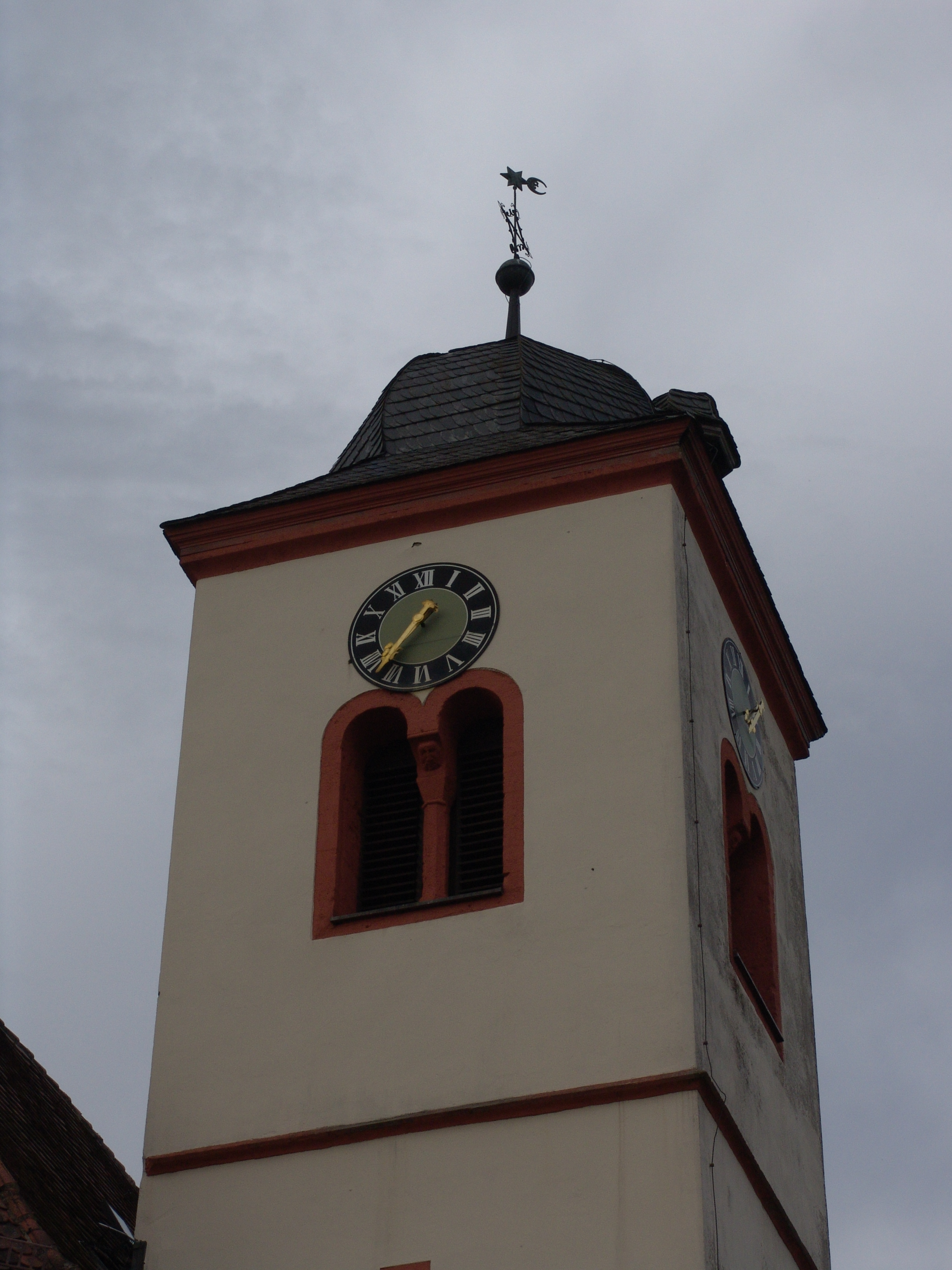 evang.-luth Kirche in Gnodstadt